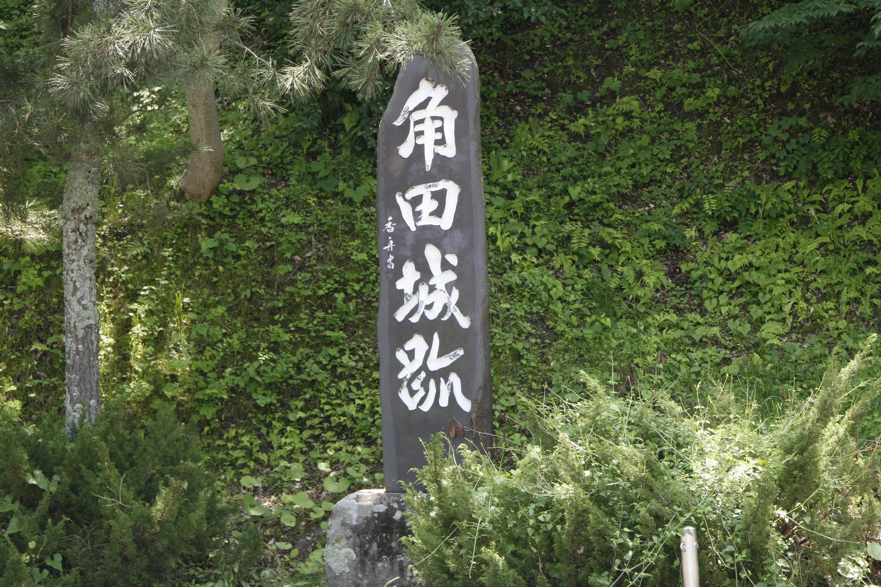 角田城の石碑